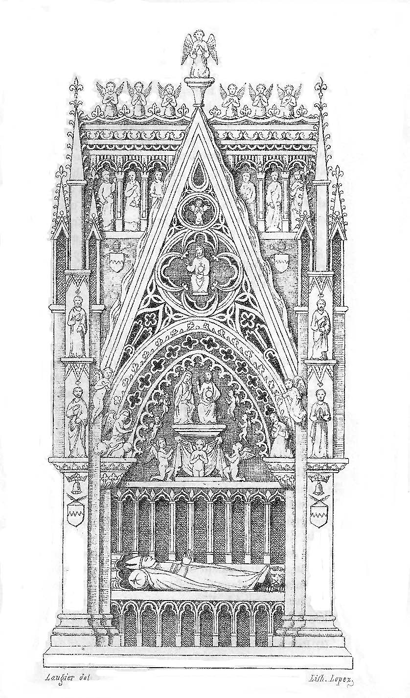 Tombeau d'Urbain V qui se trouvait dans l'abbaye de Saint-Victor à Marseille. Ce monument a disparu pendant la Révolution. Il n'est connu que par ce dessin du XVIIIème siècle.